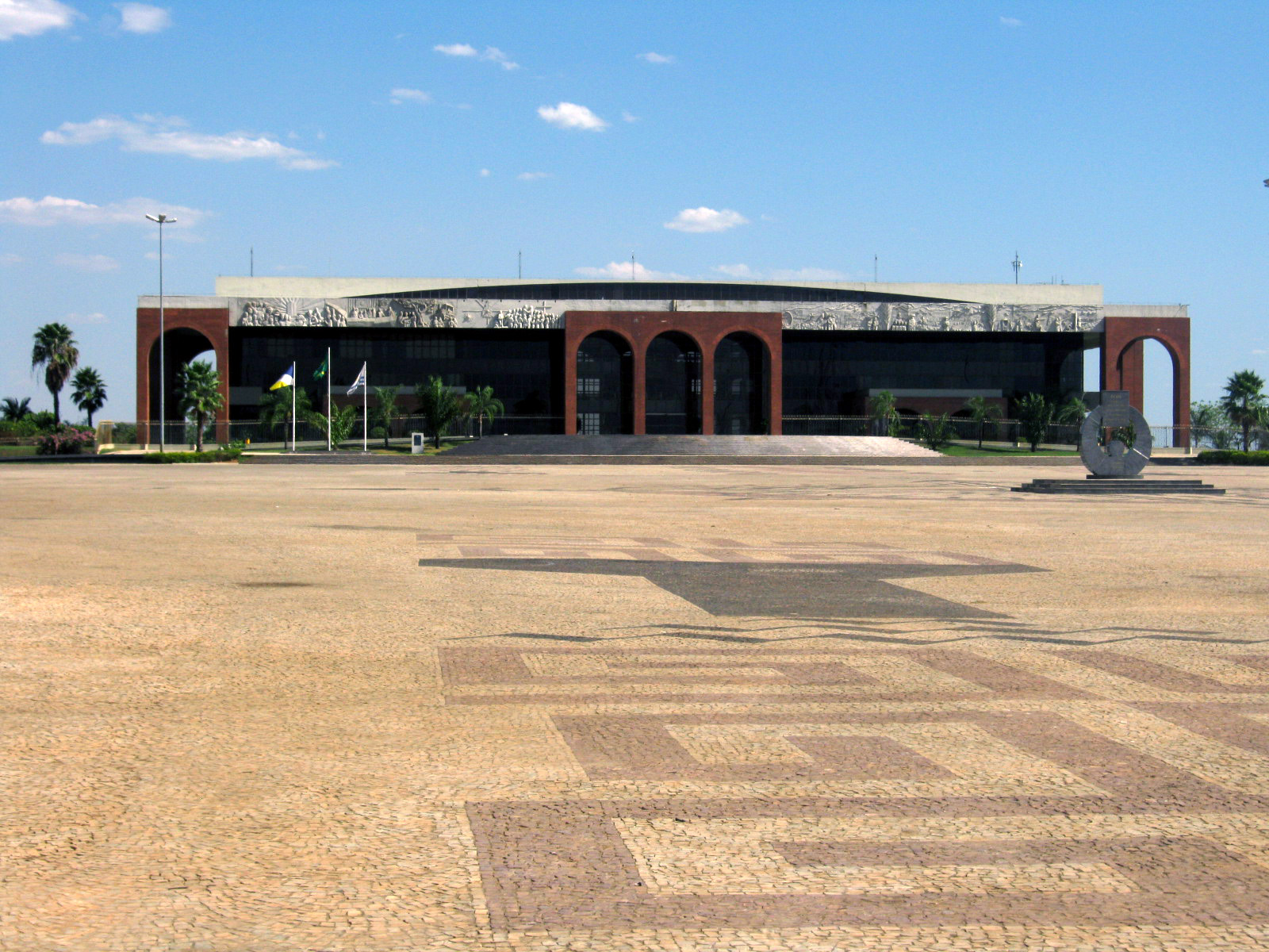 Palácio Araguaia, sede do governo do Tocantins em Palmas, Brasil